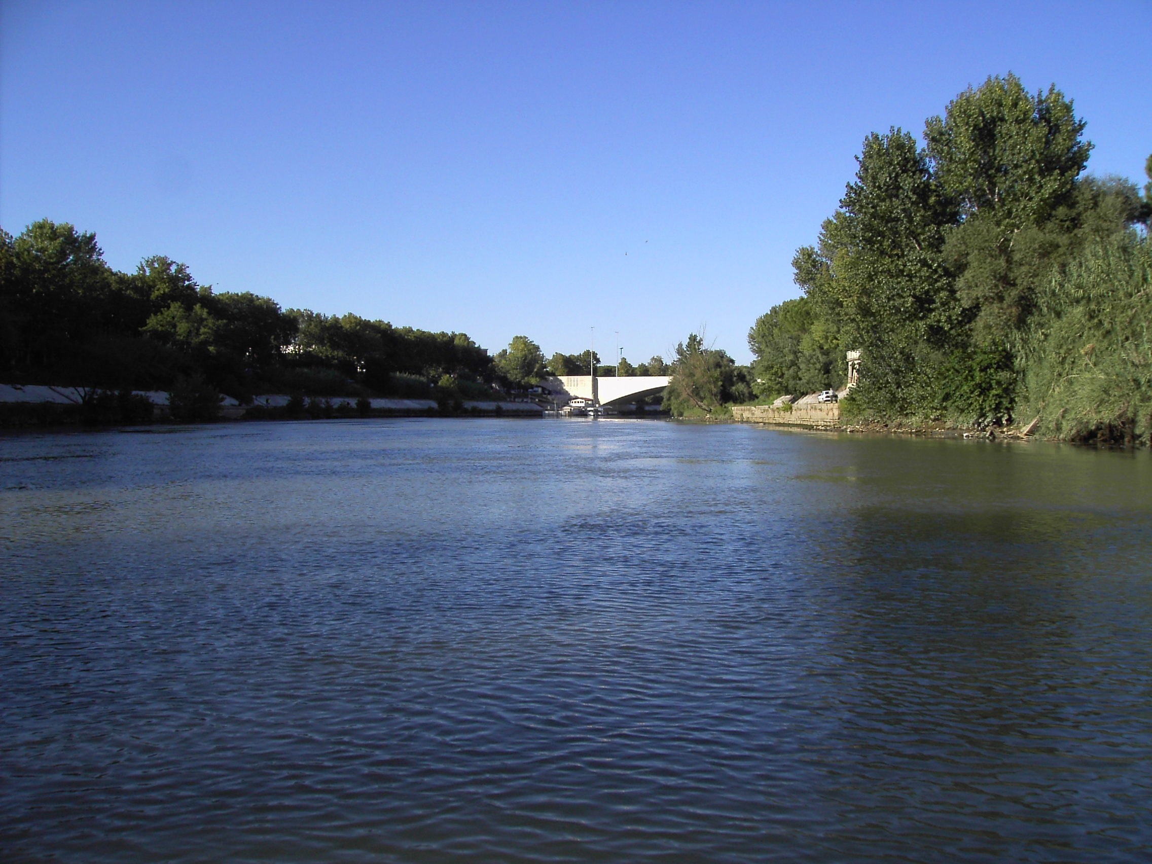 Roma, Tevere a Ponte duca d'Aosta